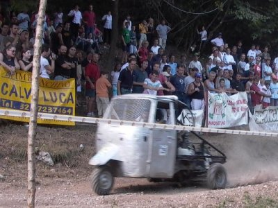 XIII.o Caliera Trophy, 24 agosto 2003